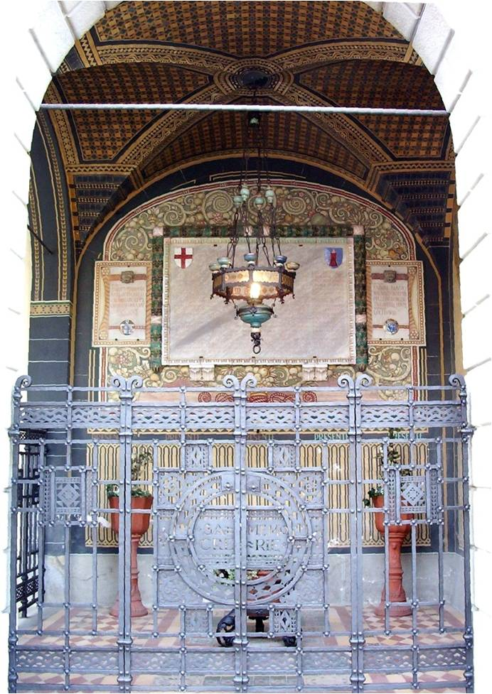 Tito Chini, decorazioni della Cappella dedicata ai caduti delle Grande guerra a Palazzuolo sul Senio